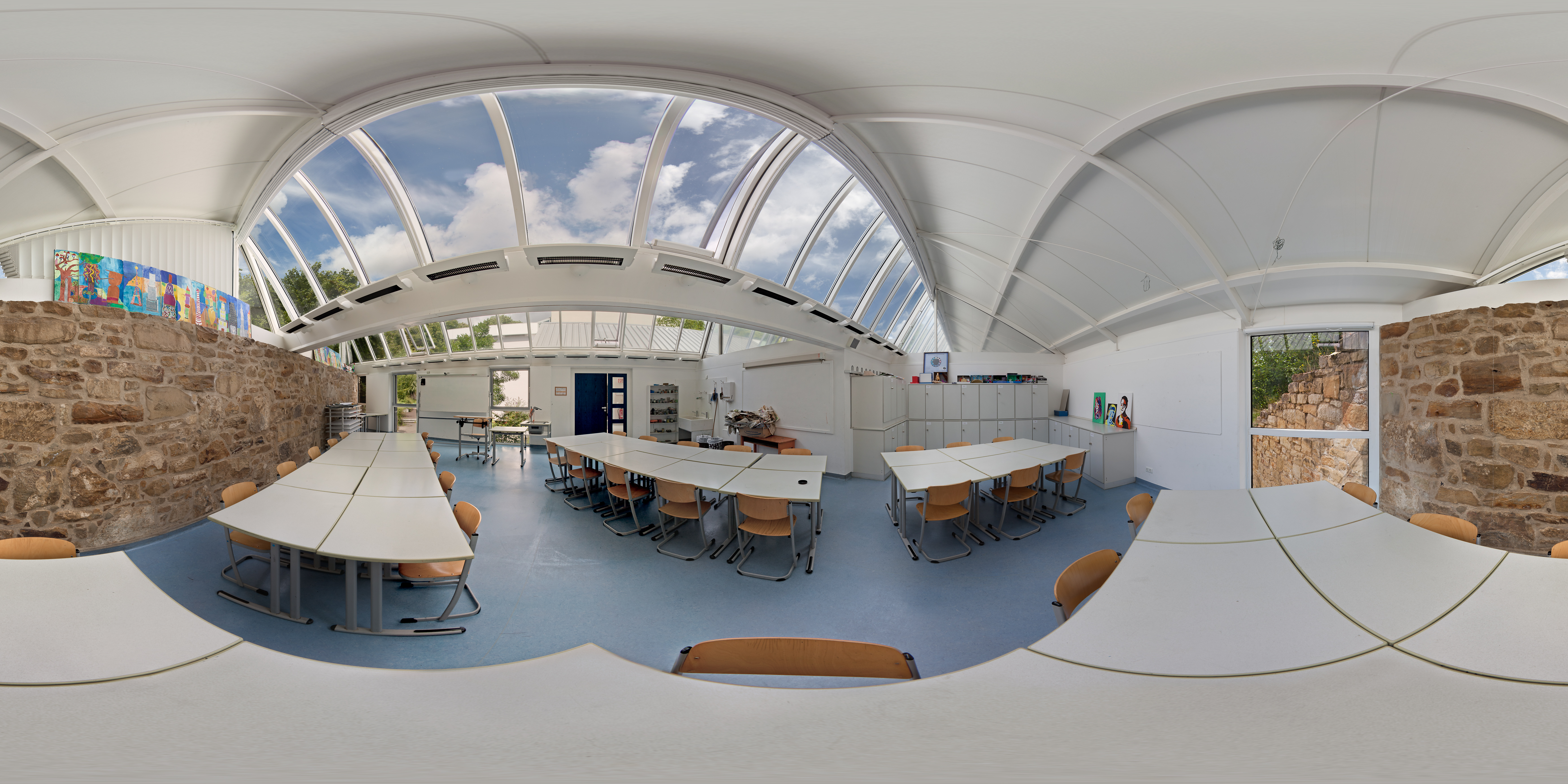 Der Kunstraum K11. Haus der Kunst des Gymnasium Andreanum. Erbaut 1988. Kugelpanorama aus 8 Einzelaufnahmen.